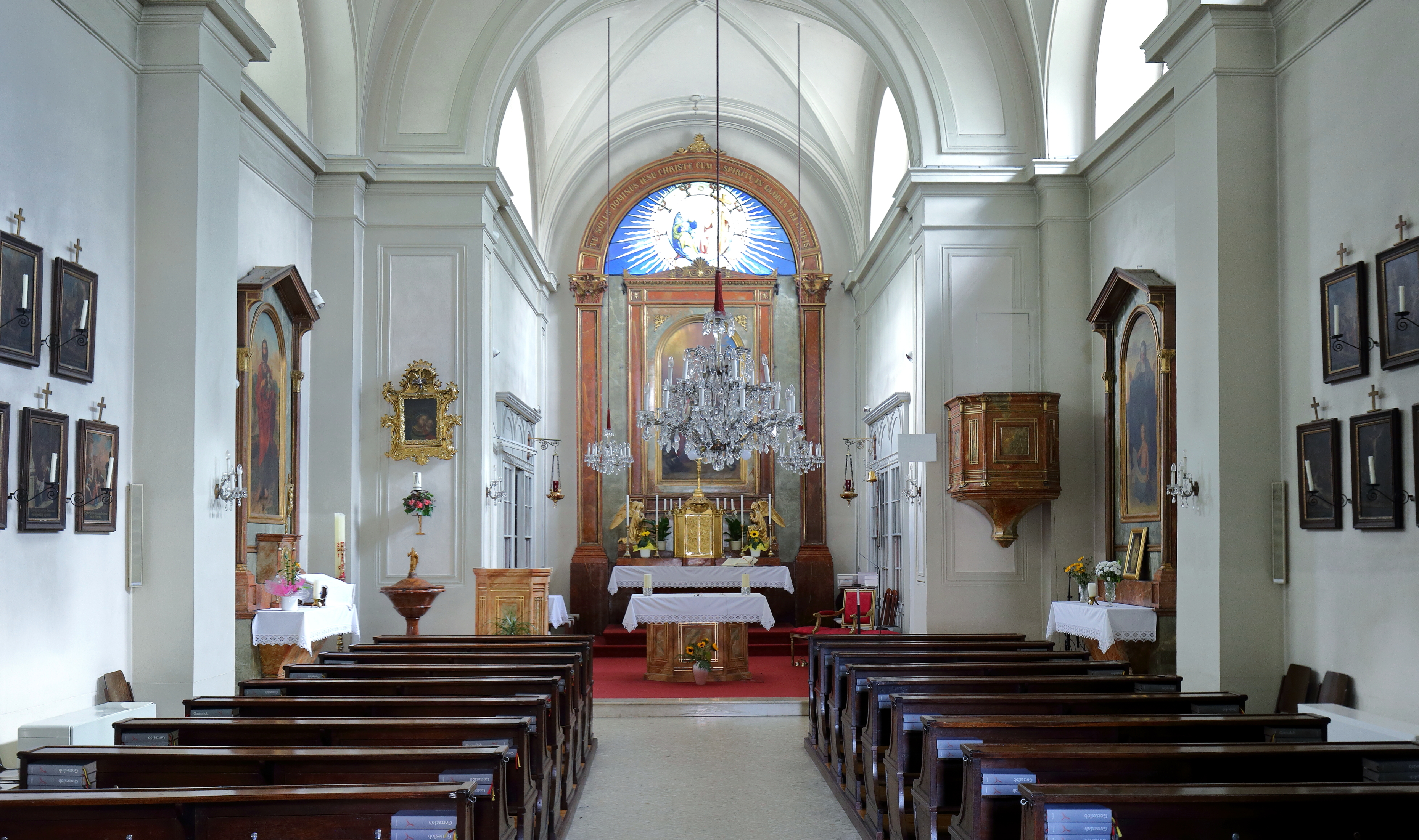 Innenansicht der Pfarrkirche hl. Oswald am Khleslplatz in Altmannsdorf, ein Bezirksteil des 12. Wiener Gemeindebezirkes Meidling. Die einschiffige Kirche mit geradem Chorabschluss wurde in den Jahren 1838/39 nach den Plänen des Architekten Franz Lößl errichtet.